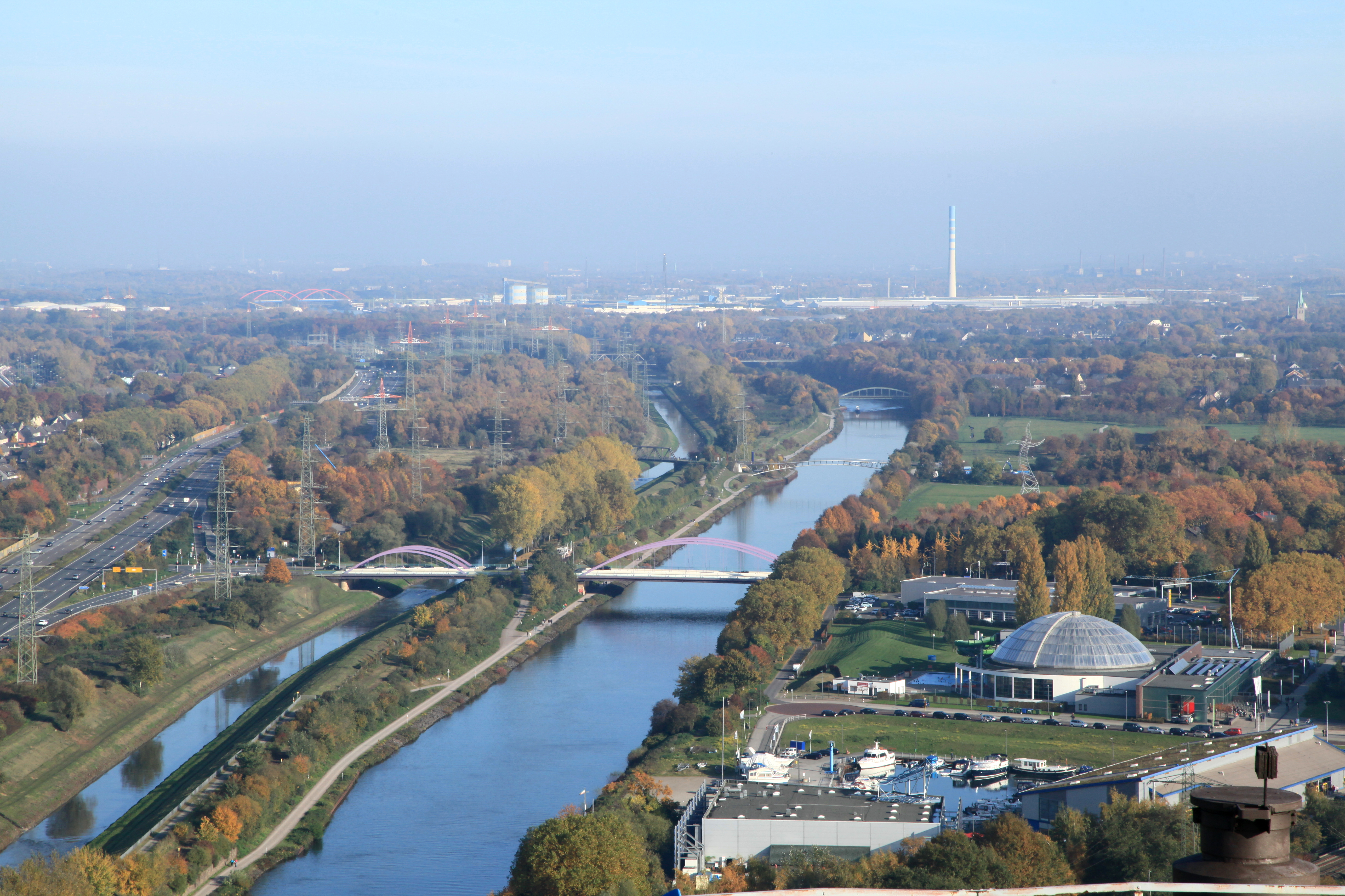 Blick vom Gasometer zu A42, Rhein-Herne-Kanal und Emscher in Oberhausen